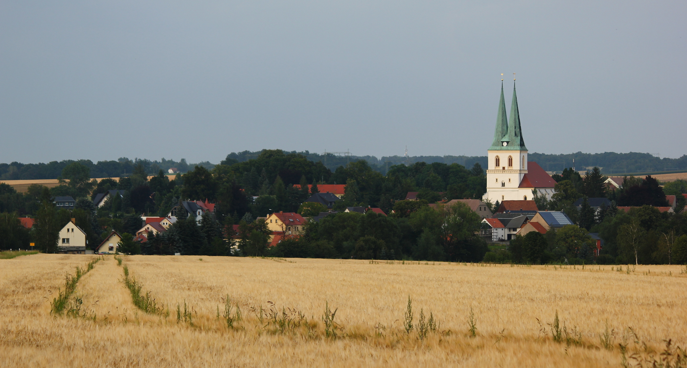 Blick von Westen auf den Ort Göda im Landkreis Bautzen, Sachsen. Hornjoserbsce: Napohlad Hodźija ze zapada.